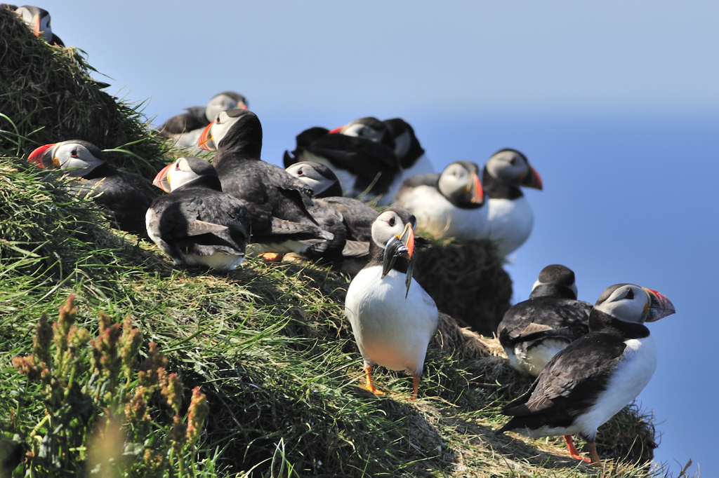 Auf den Färöern leben etwa 1,1 Mio. Papageitaucher. Im größten Teil des Verbreitungsgebietes bilden Fische die fast ausschließliche Nestlingsnahrung. Erbeutet werden die häufigen tagsüber erreichbaren Schwarmfische, dies sind vor allem Sandaale (Ammodytidae), Sprotte, Lodde und Atlantischer Hering. Im Nordpolarmeer werden Vielborster und Krebstiere auch regelmäßig an die Nestlinge verfüttert. Papageitaucher tragen die gefangenen Fische quer im Schnabel. Sie werden mit der Zunge gegen den Oberschnabel gedrückt, bis die ganze Schnabellänge mit Fisch gefüllt ist.